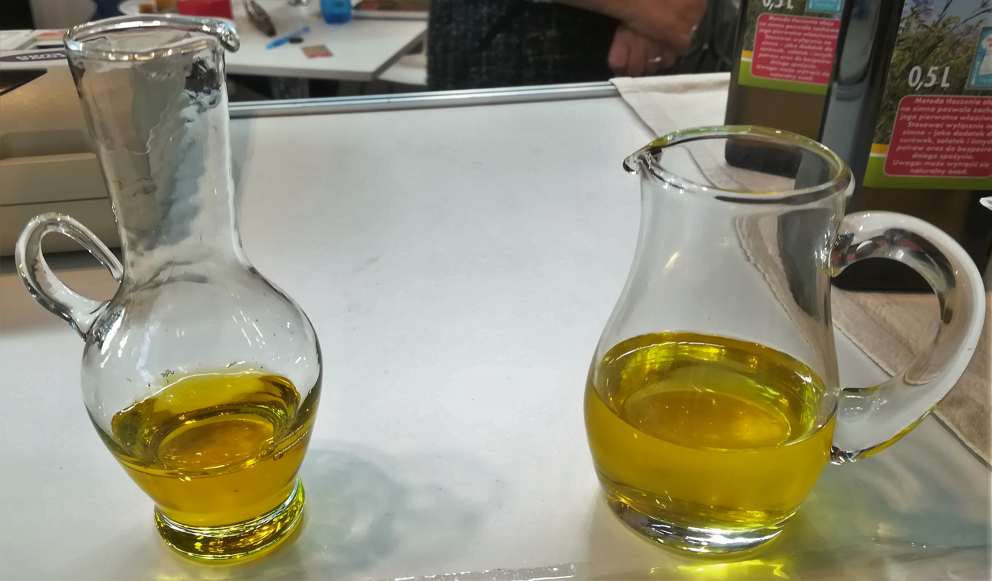 Olej Głubczycki na targach Smaki Regionów w Poznaniu - 2018r.